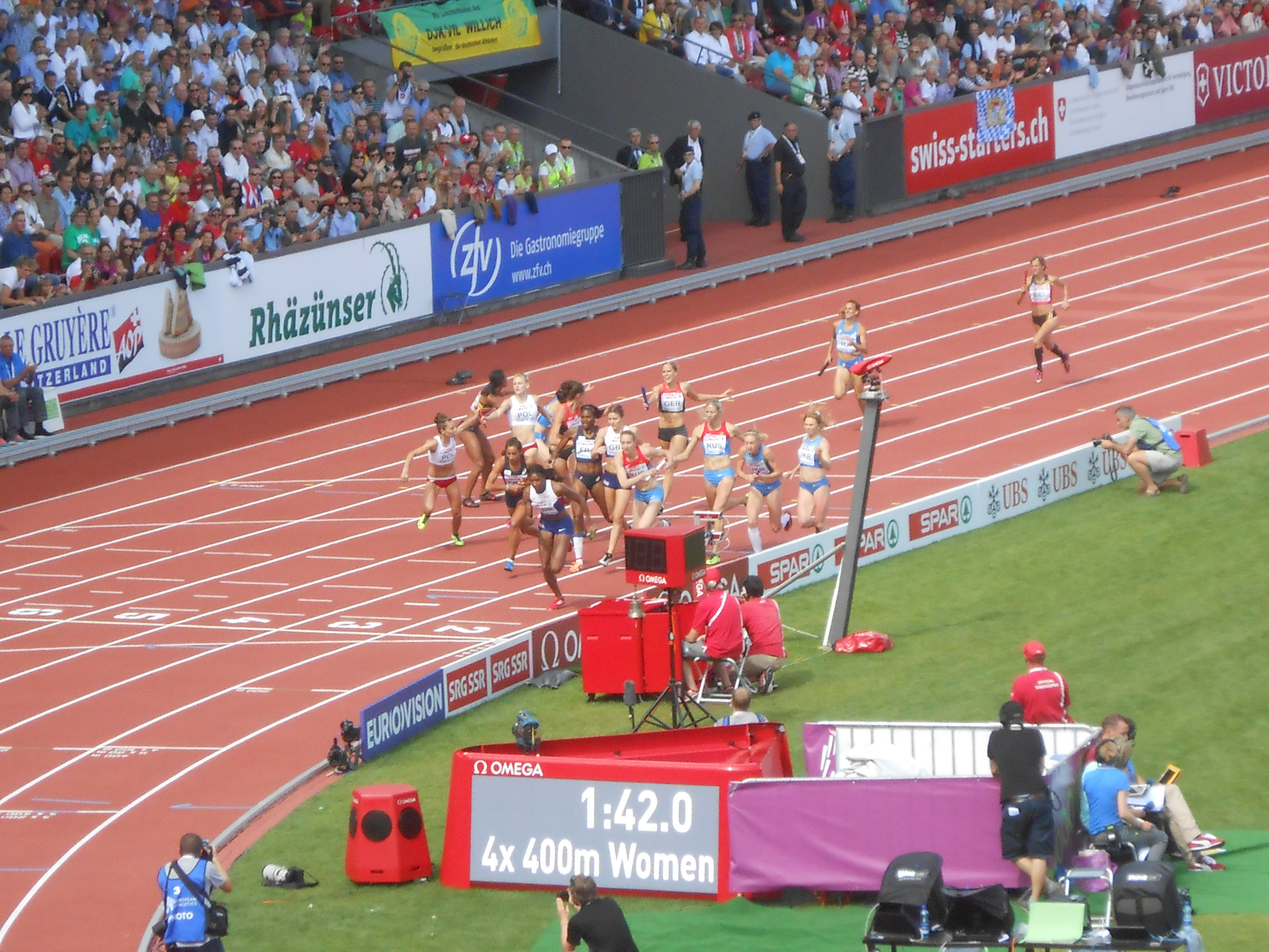 The women's 4 × 400 m relay at the 2014 European Athletics Championships.